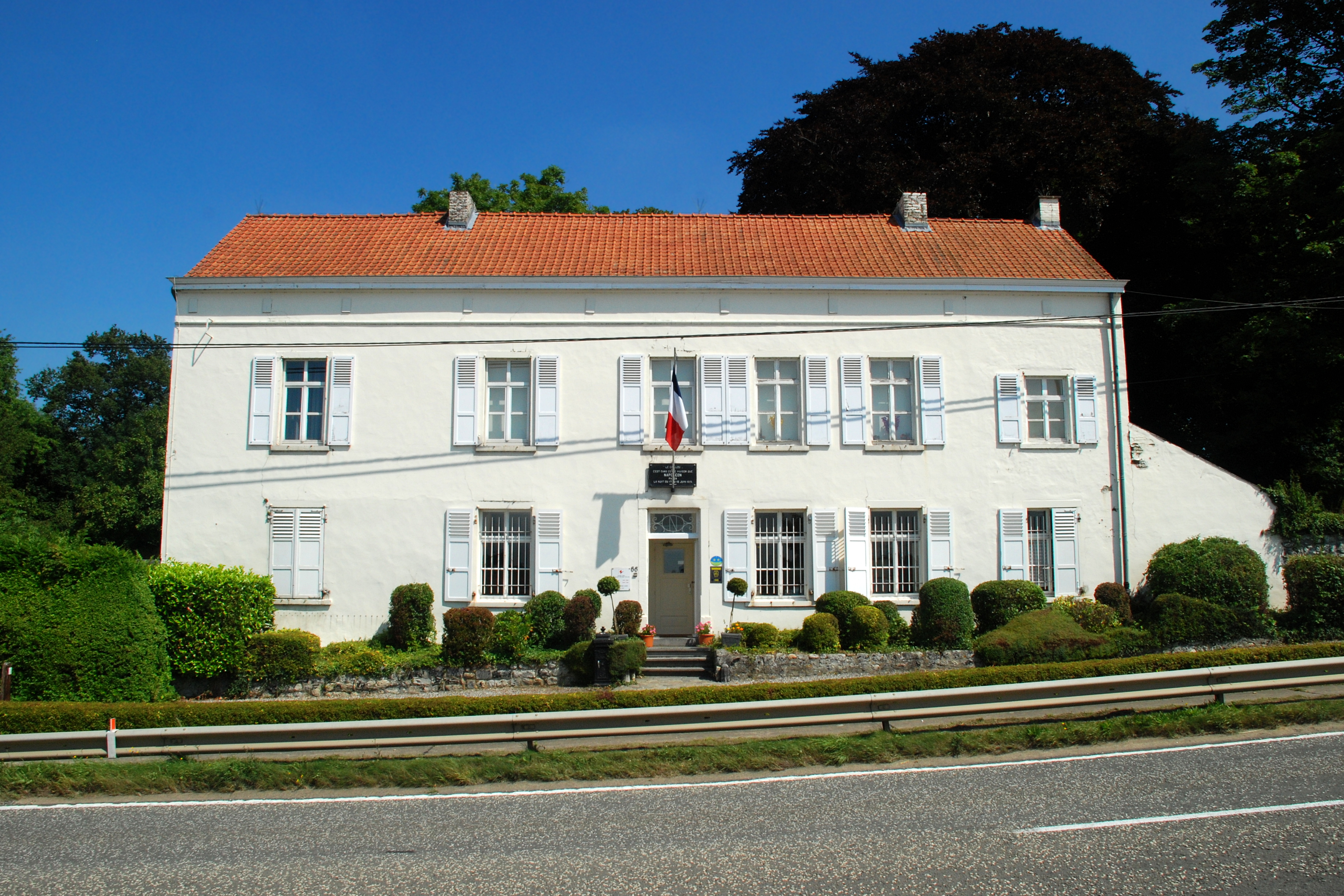 Belgique - Brabant wallon - Genappe - Ferme du Caillou